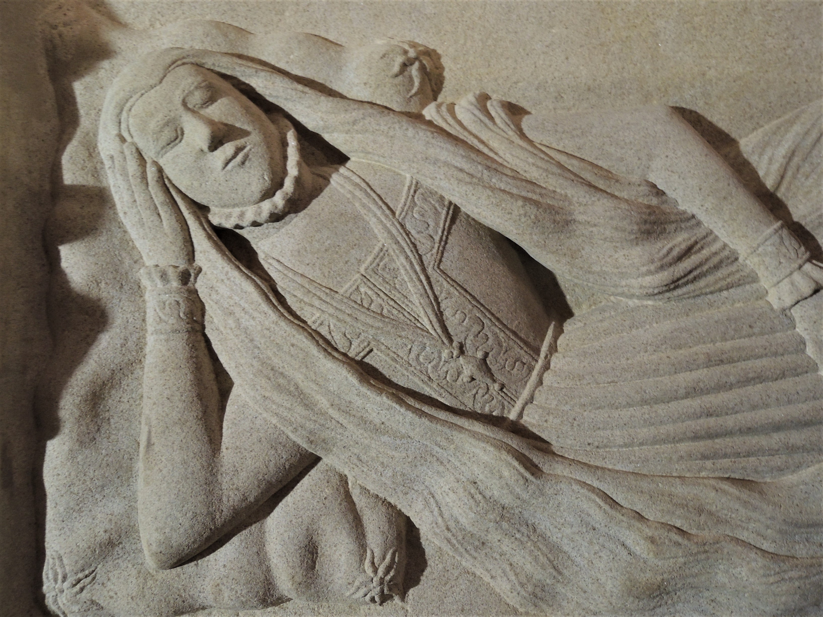 Renesansowy nagrobek symboliczny Stanisława i Jadwigi Myszkowskich znajdujący się w prezbiterium kościoła pw. Wniebowzięcia Najświętszej Maryi Panny w Bestwinie w trakcie prac konserwatorskich (2016 rok)